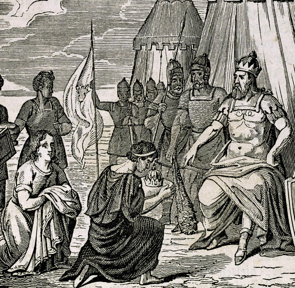 Romulus Augustus odovzdáva insígnie do rúk Odoakera.